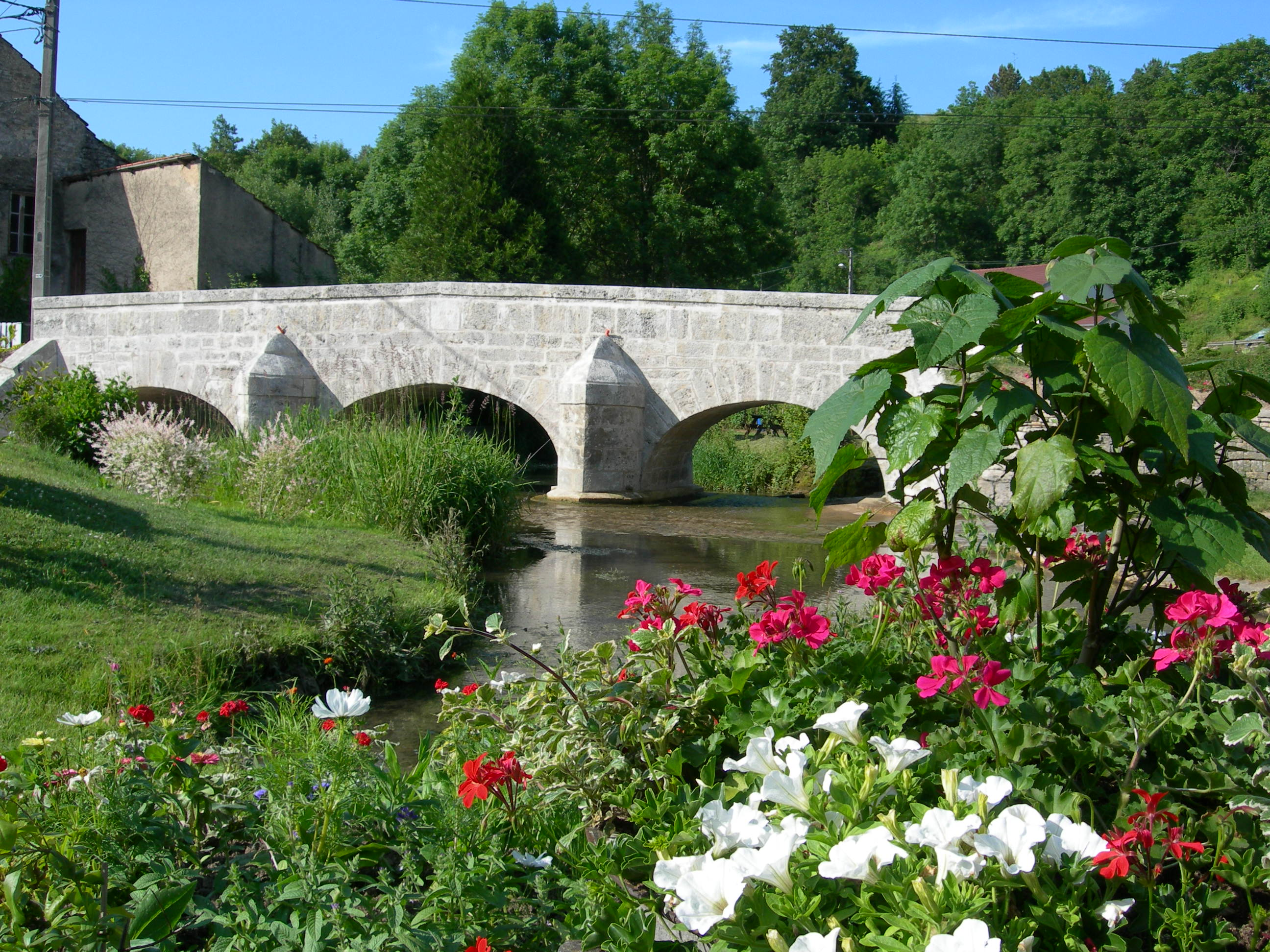 Le pont situé à Rollainville date du XVIIIème siècle.